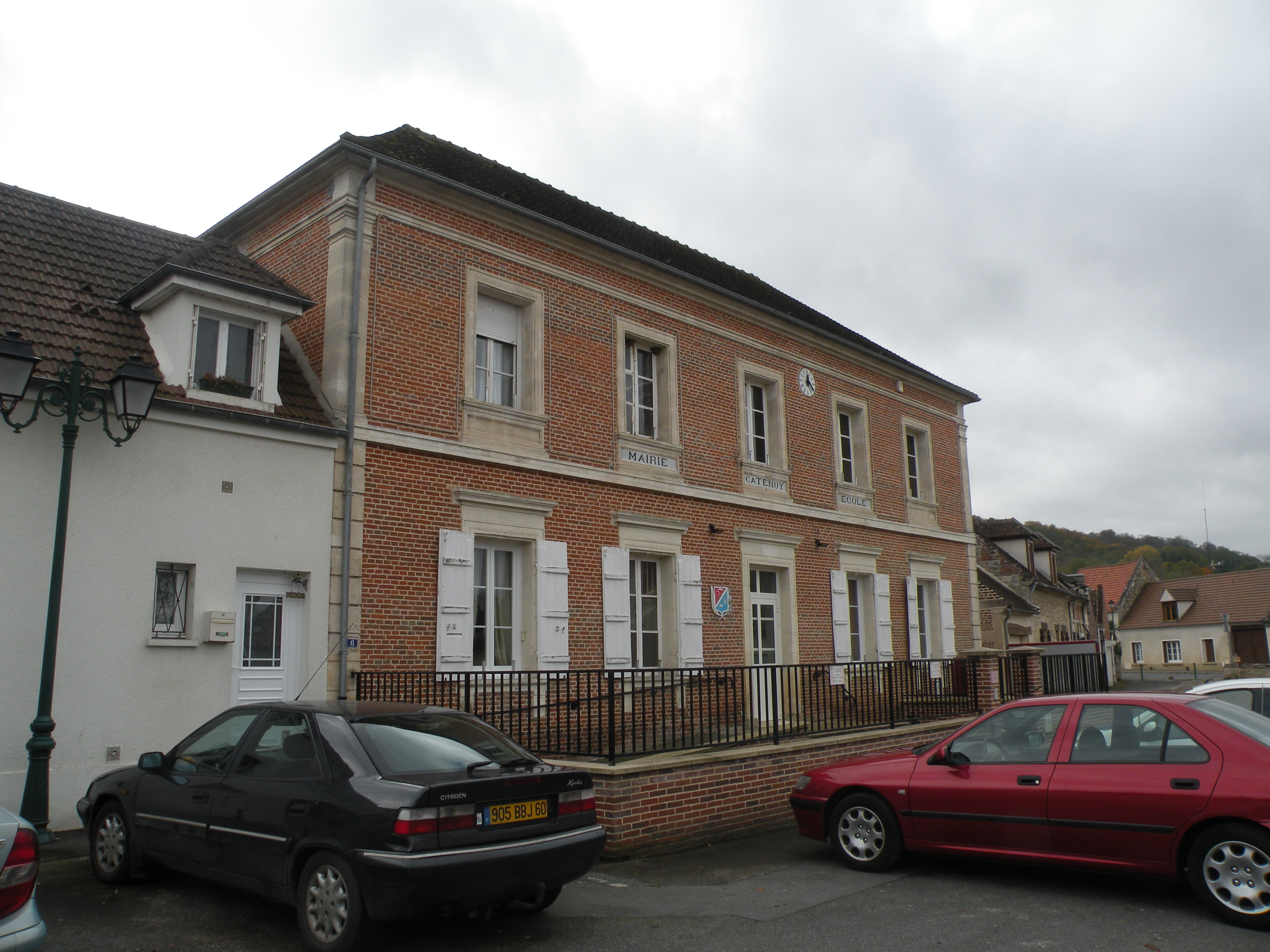 Catenoy mairie